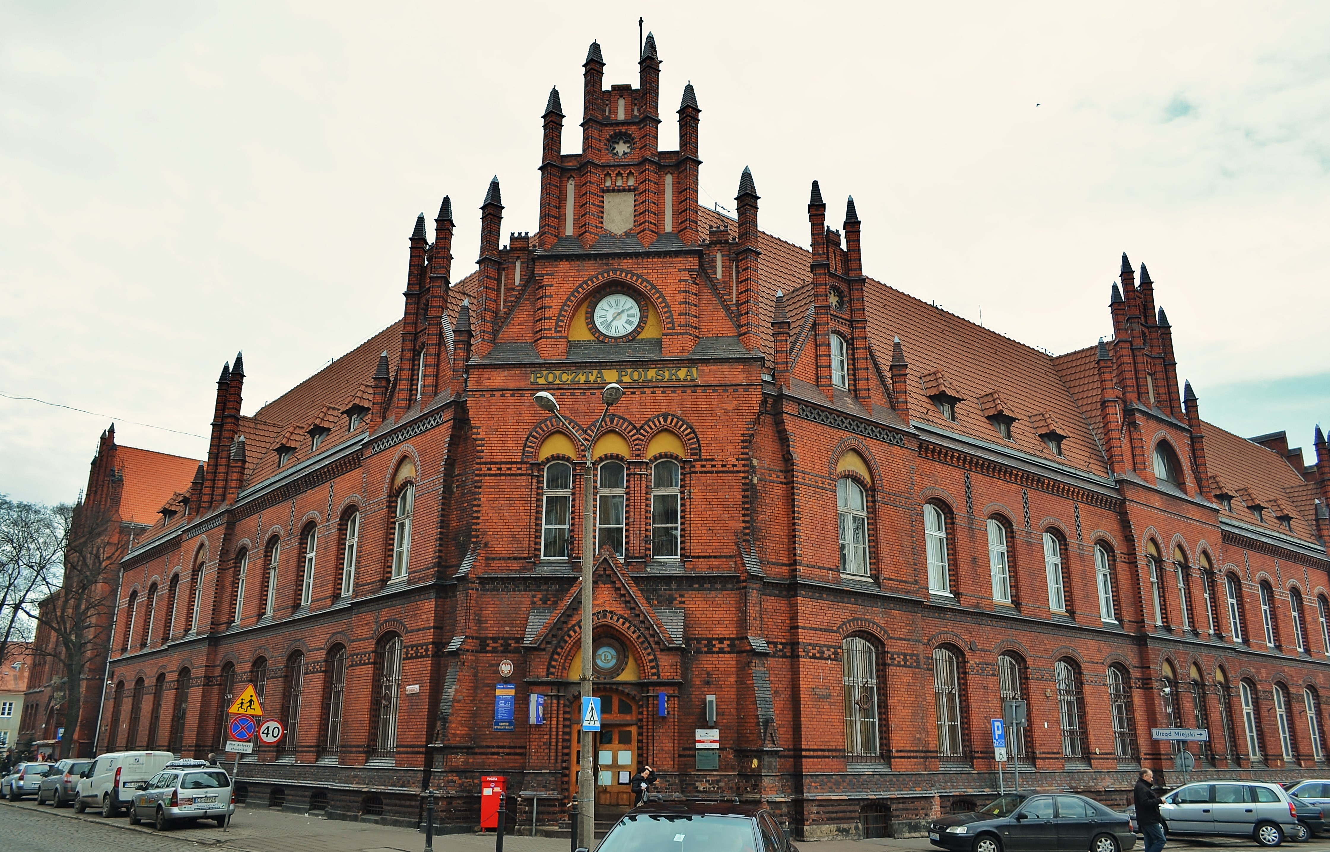 Główna Poczta w Grudziądzu